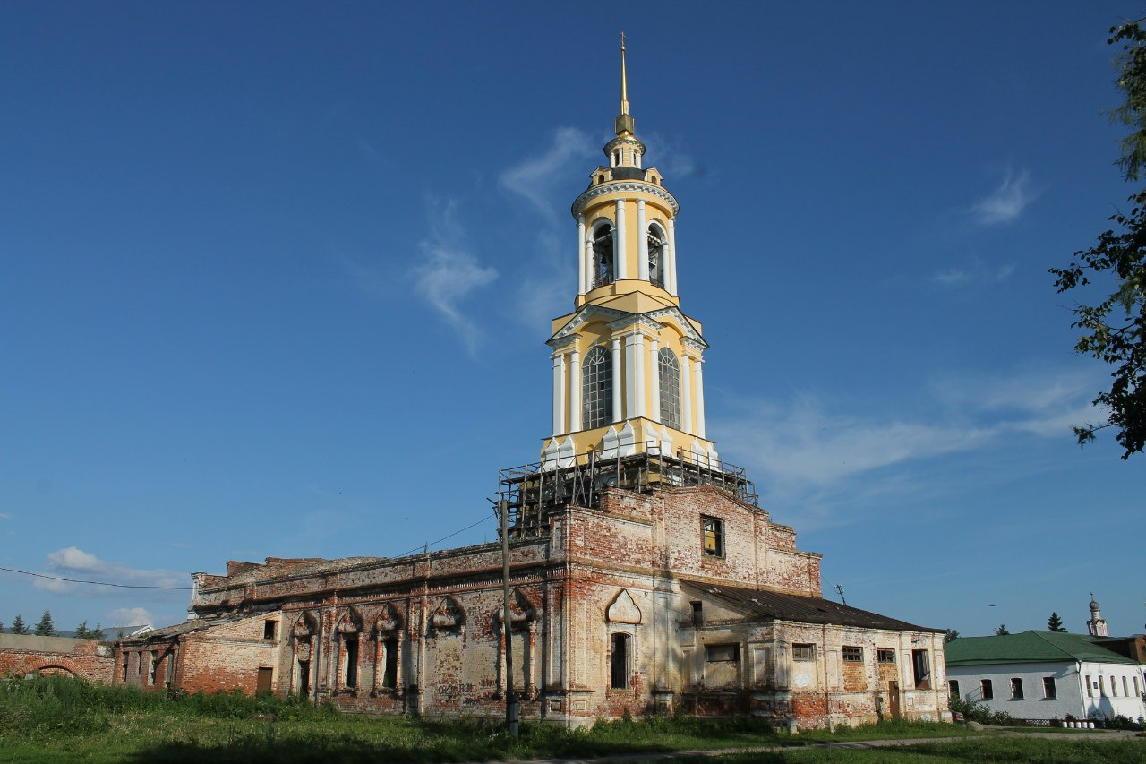 Колокольня (Владимирская область, Суздаль, Ленина улица)